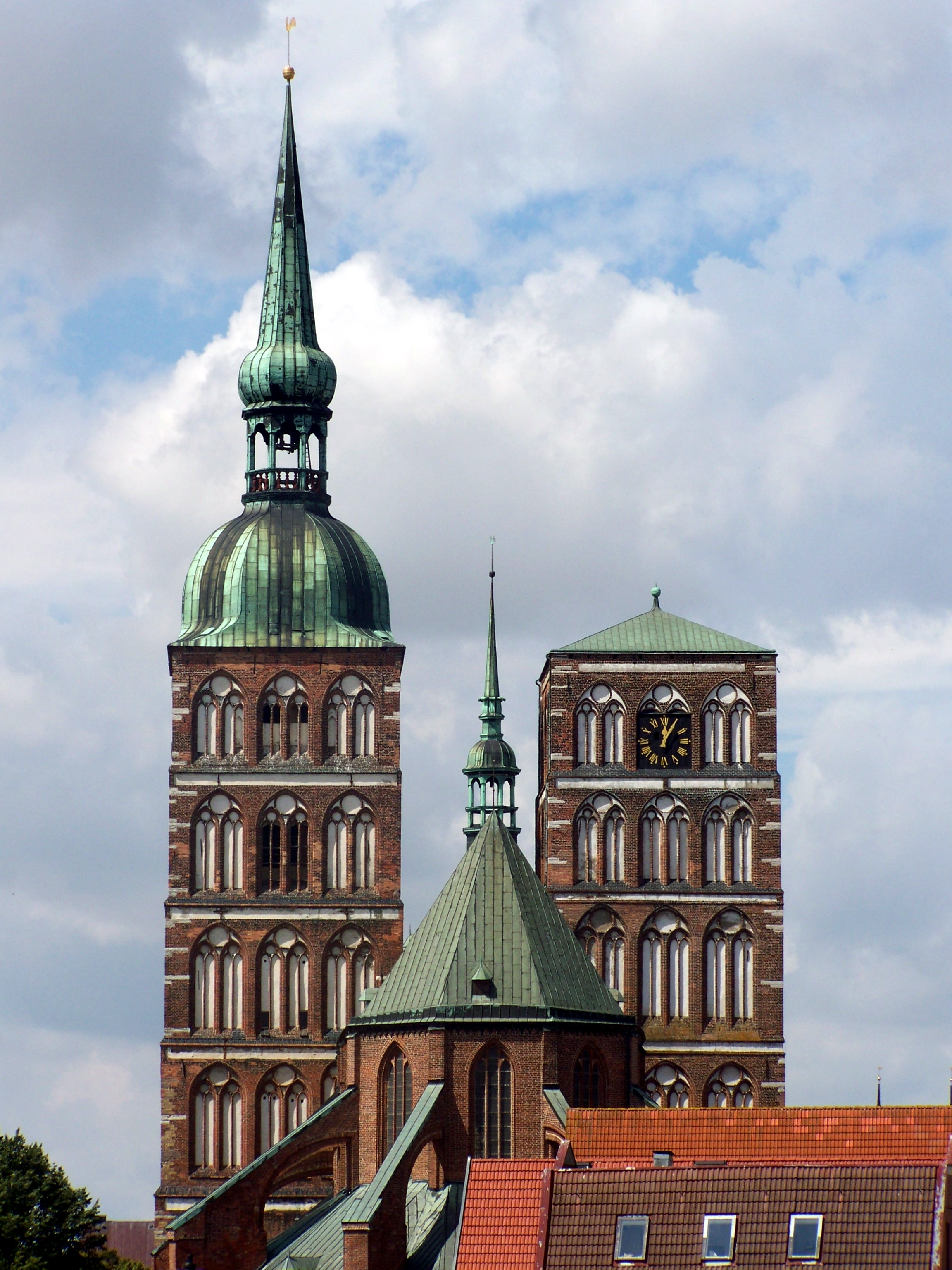 Die Nikolaikirche in Stralsund, vom Dach des Ozeaneums aus gesehen.